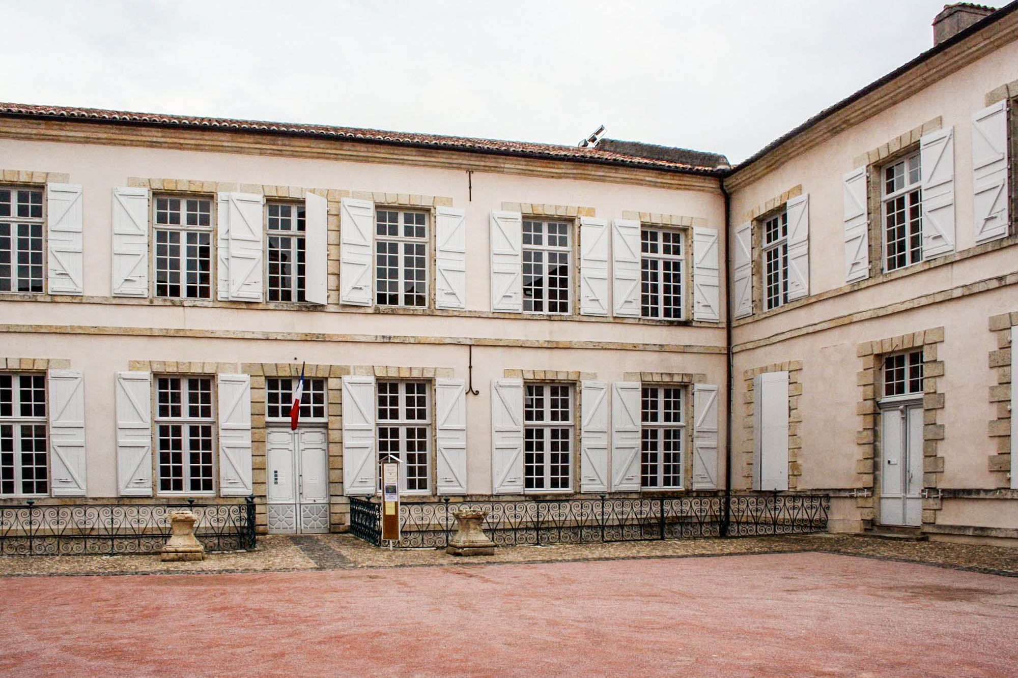 Hôtel de ville de Lectoure (Gers, Midi-Pyrénées, France), ancien évêché, ancienne demeure du maréchal Lannes.